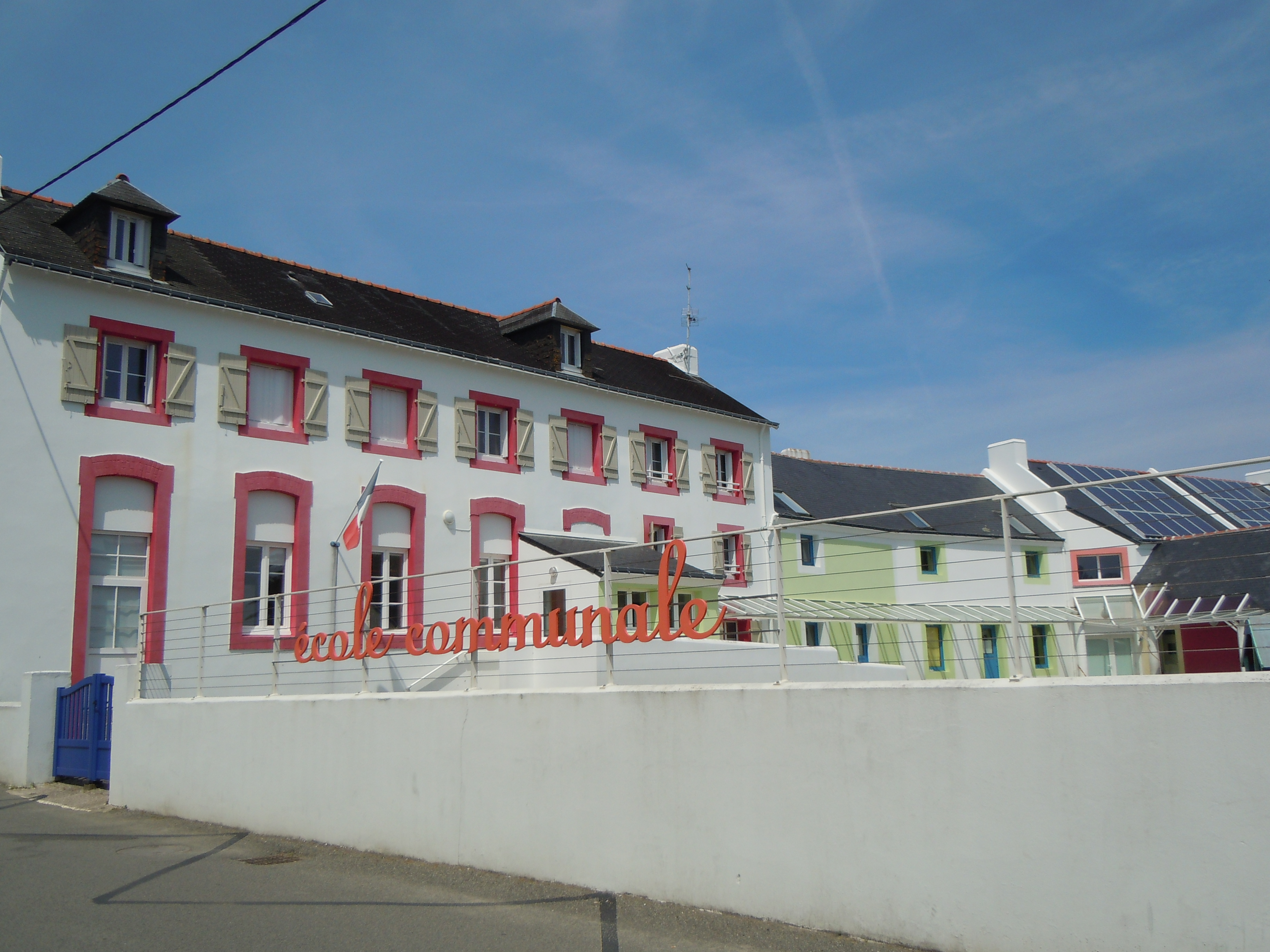 Ecole communale de Locmaria